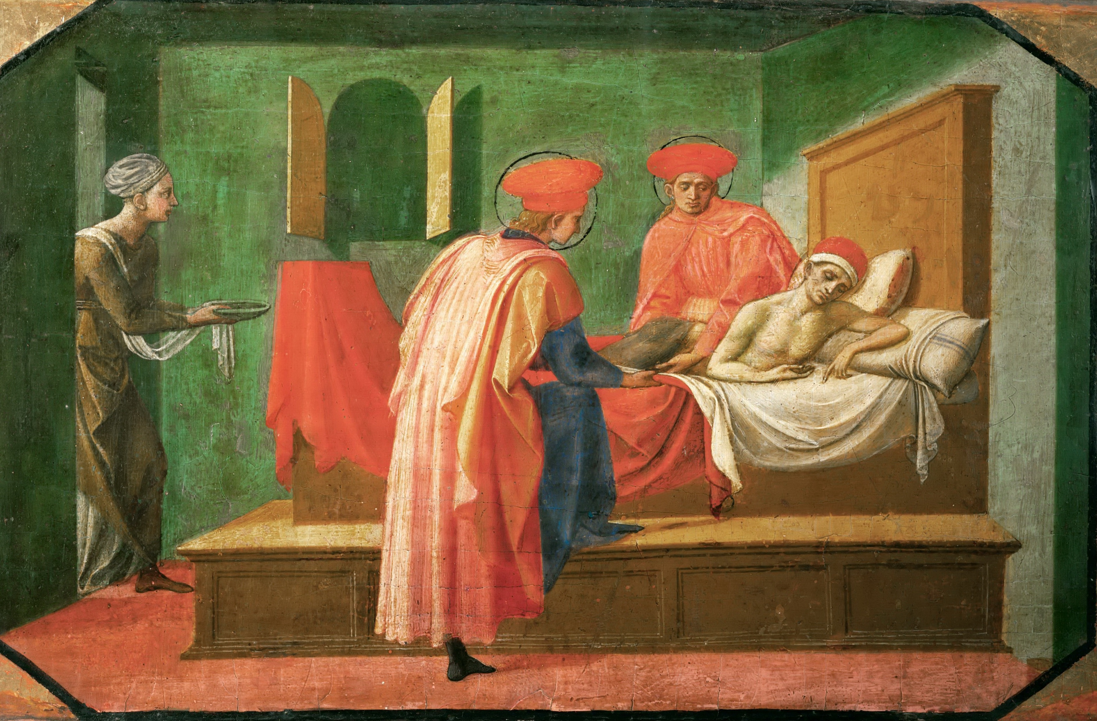 Predella from the Lippi's Pala del Noviziato detail